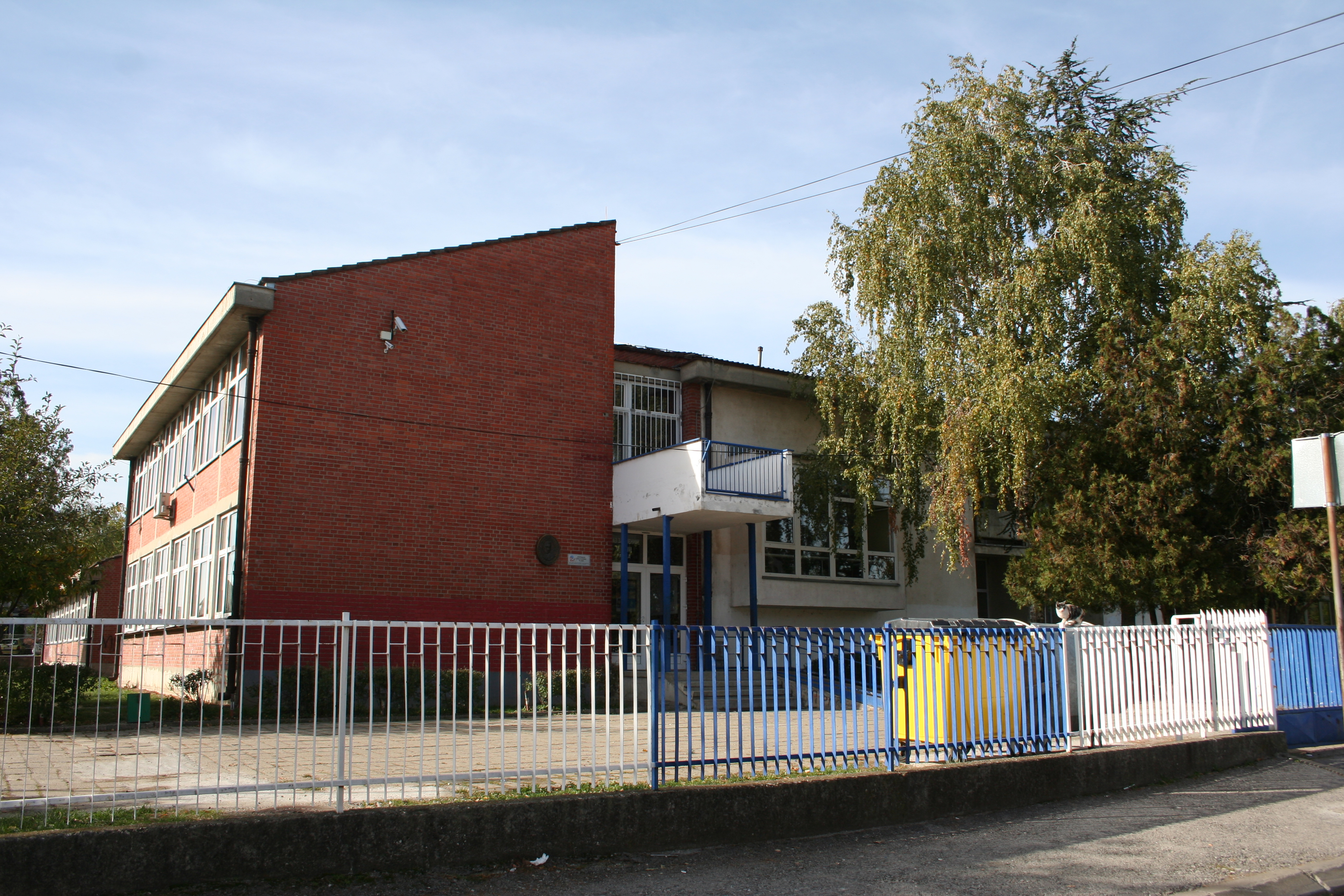 OŠ Desanka Maksimović Valjevo